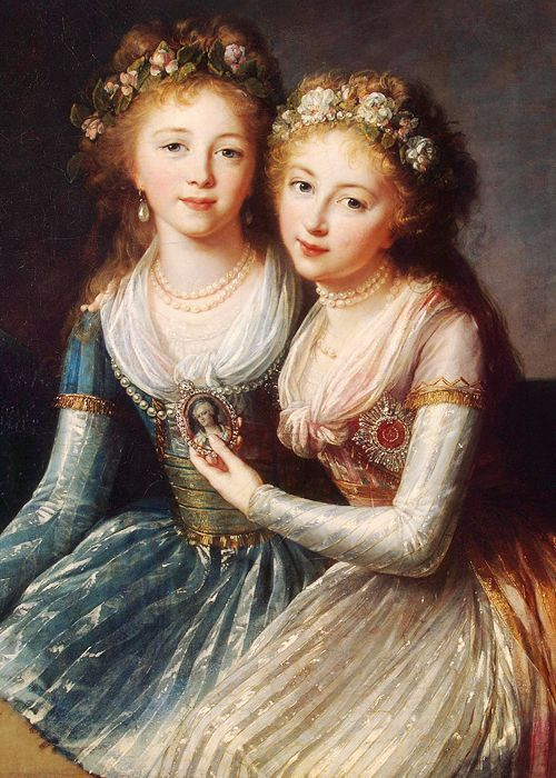 Портрет дочерей императора Павла I